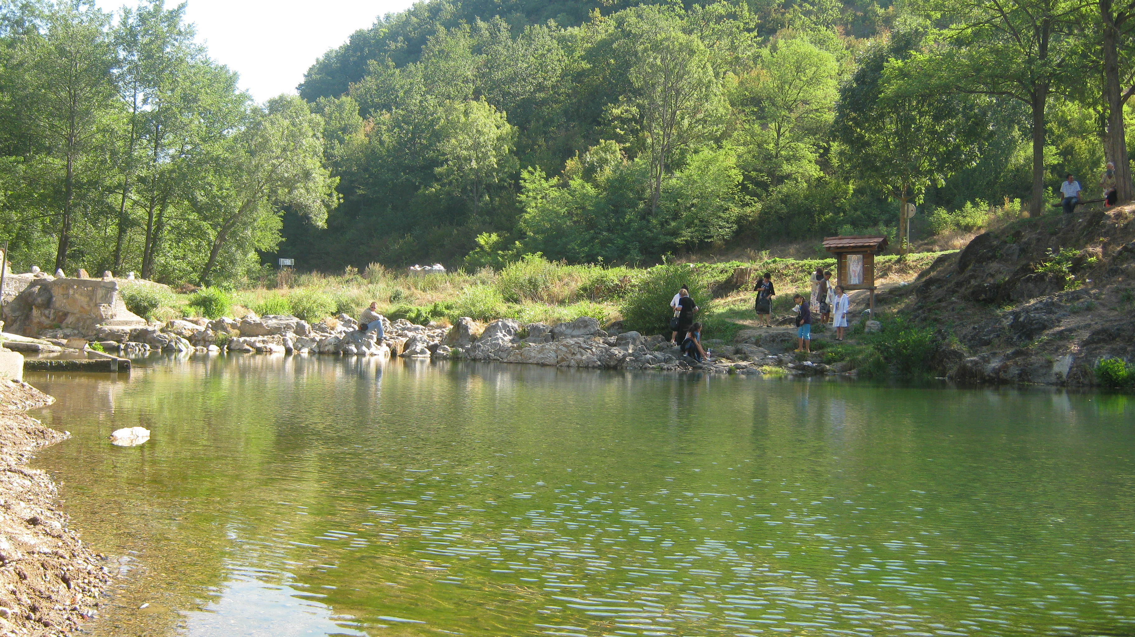 I najstariji stanovnici Šarana ne pamte da je reka Dičina prestala da teče. Na slici se vidi da je dotok vode skoro u potpunosti prestao, ali je nivo vode ispod mosta zadržan zahvaljujući brani.